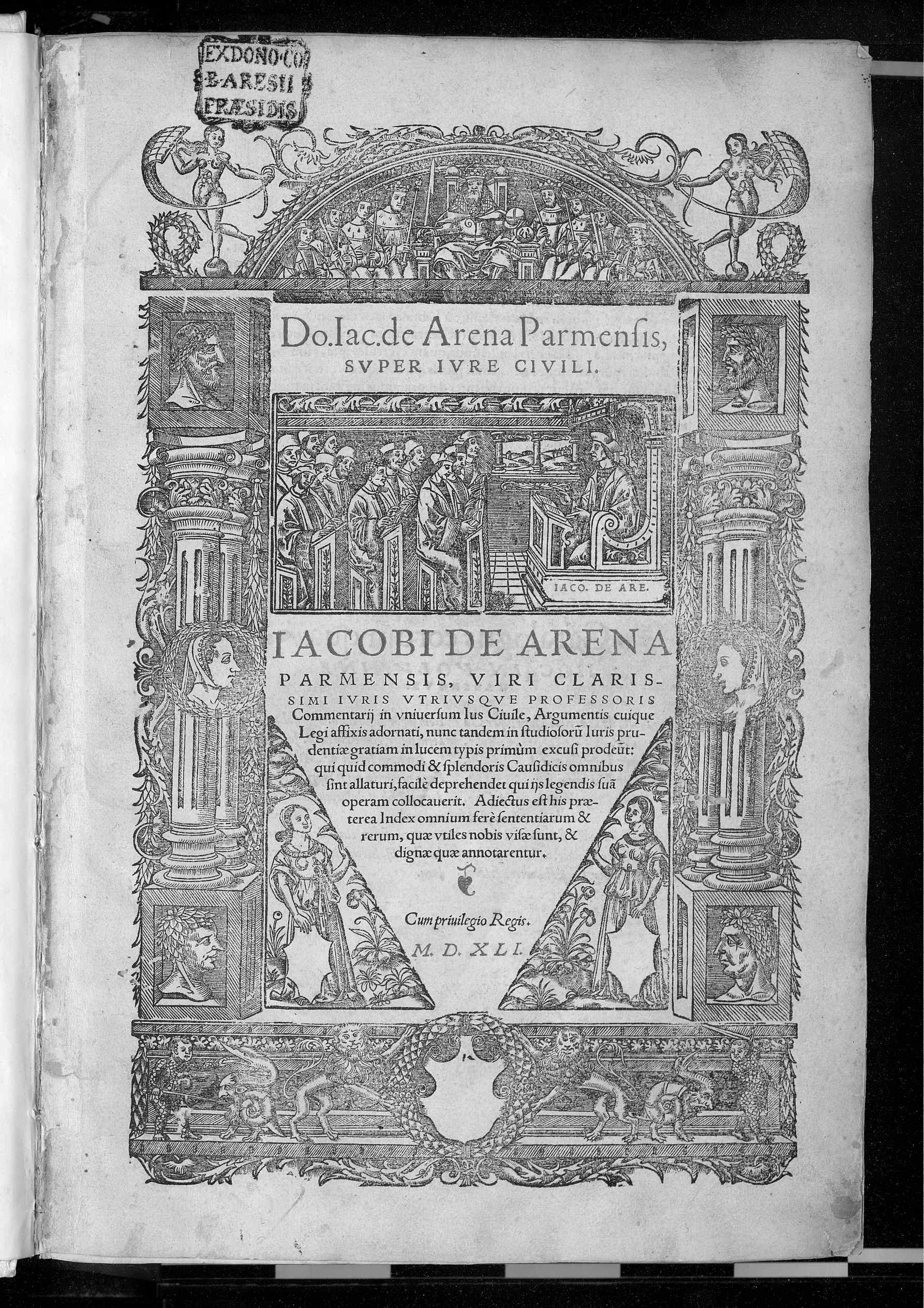 Frontespizio